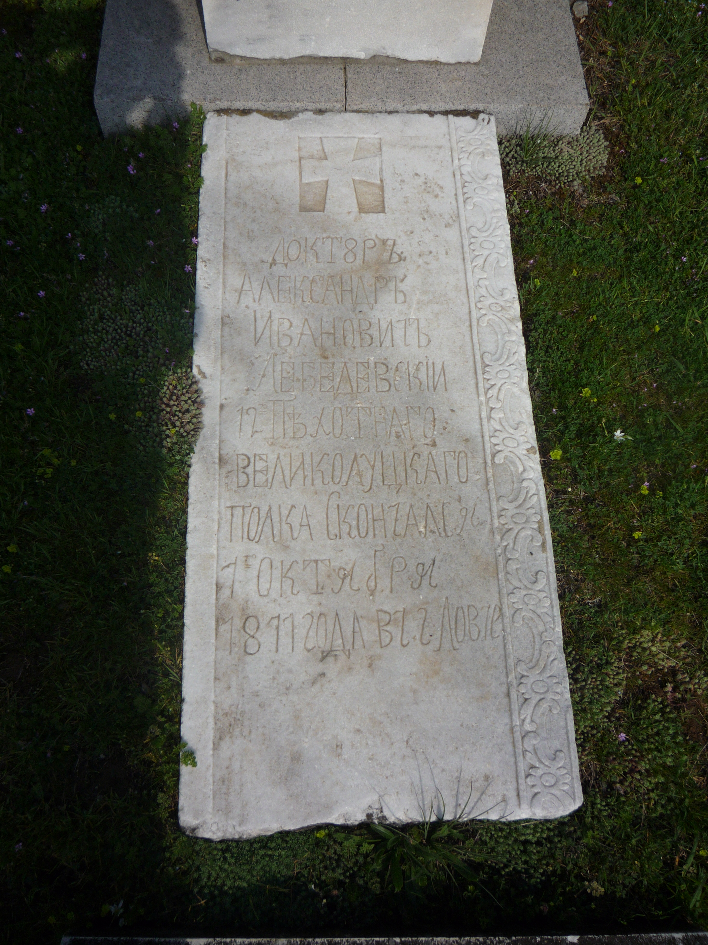 Надгробен паметник на лекаря на 12-и Великолуцки пехотен полк — Александр Лебедевски. Алея на Българо-руската дружба, хълма "Стратеш", град Ловеч.